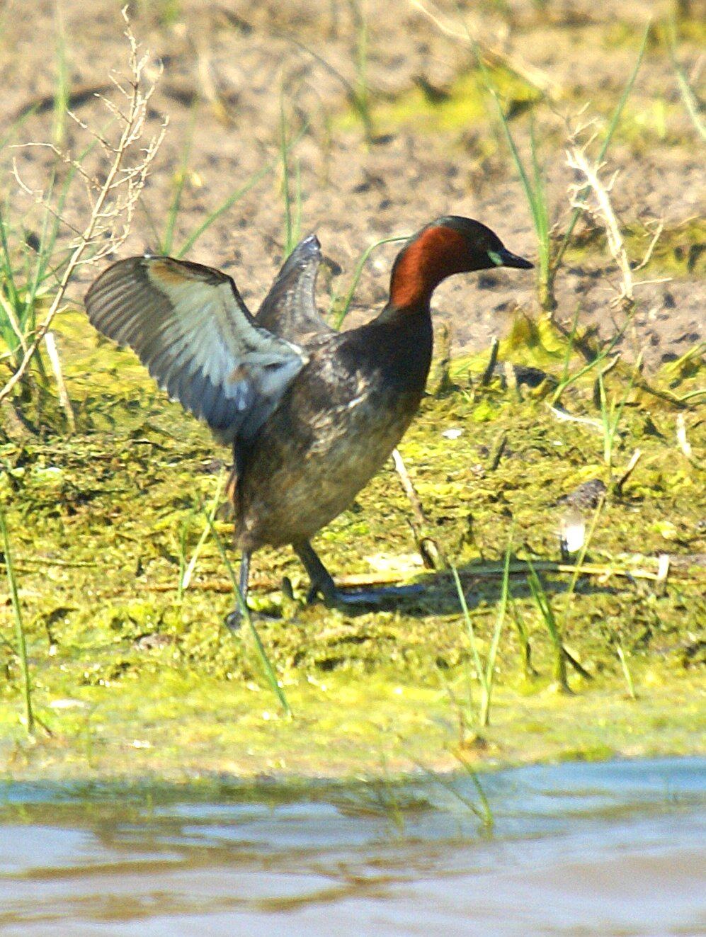 Zampullín - Cabusset - Little Grebe - Tachybaptus ruficollis, Viladecans, Barcelona, Spain